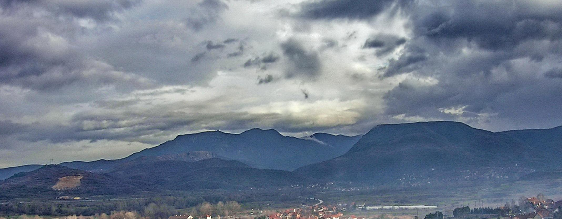 Српски (ћирилица): Сићевачка клисура почиње код села Просека где се завршавају огранци Сврљишких планина и Суве планине